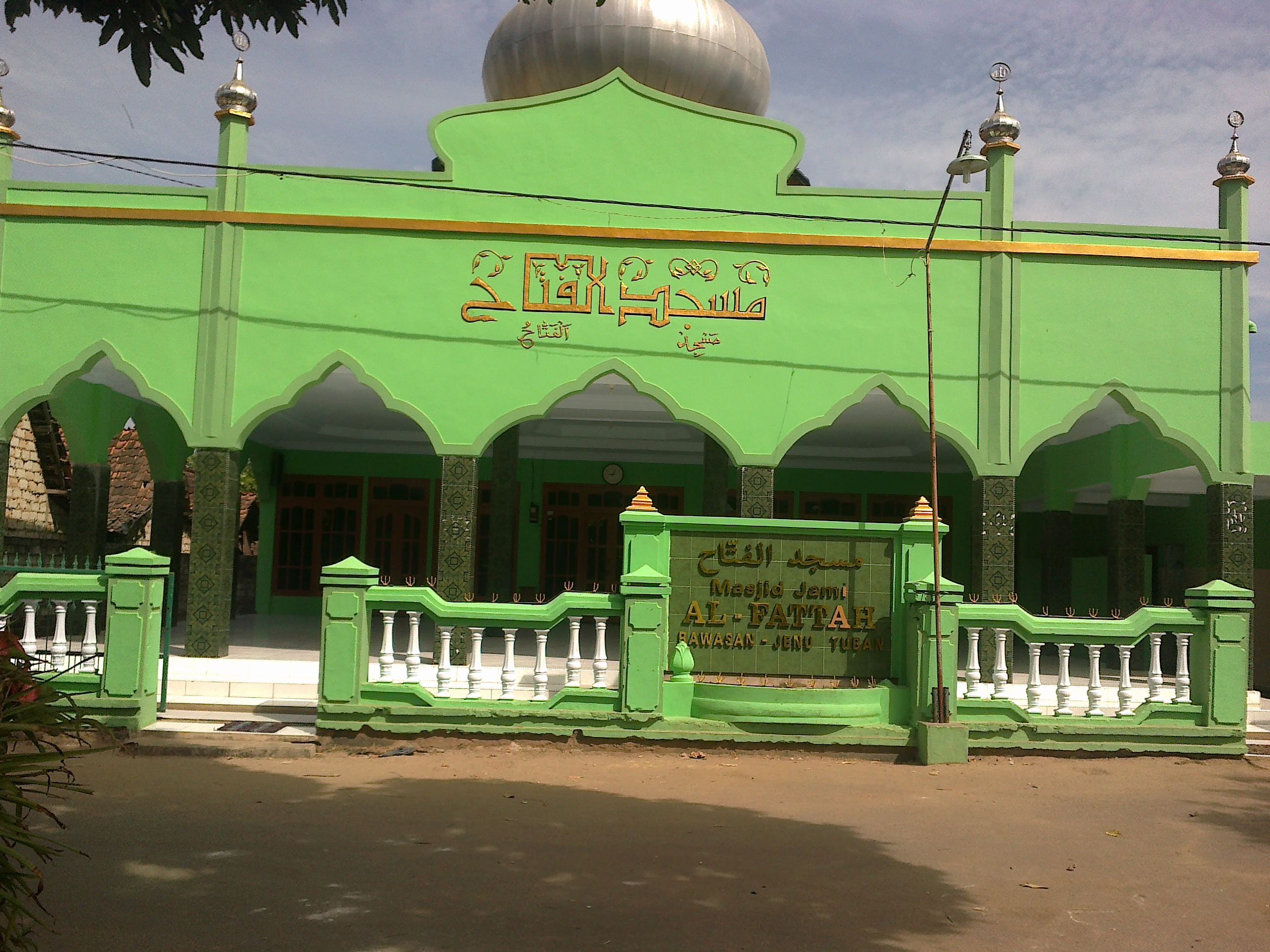 Masjid Al-Fattah Rawasan adalah masjid terbesar di Desa Rawasan